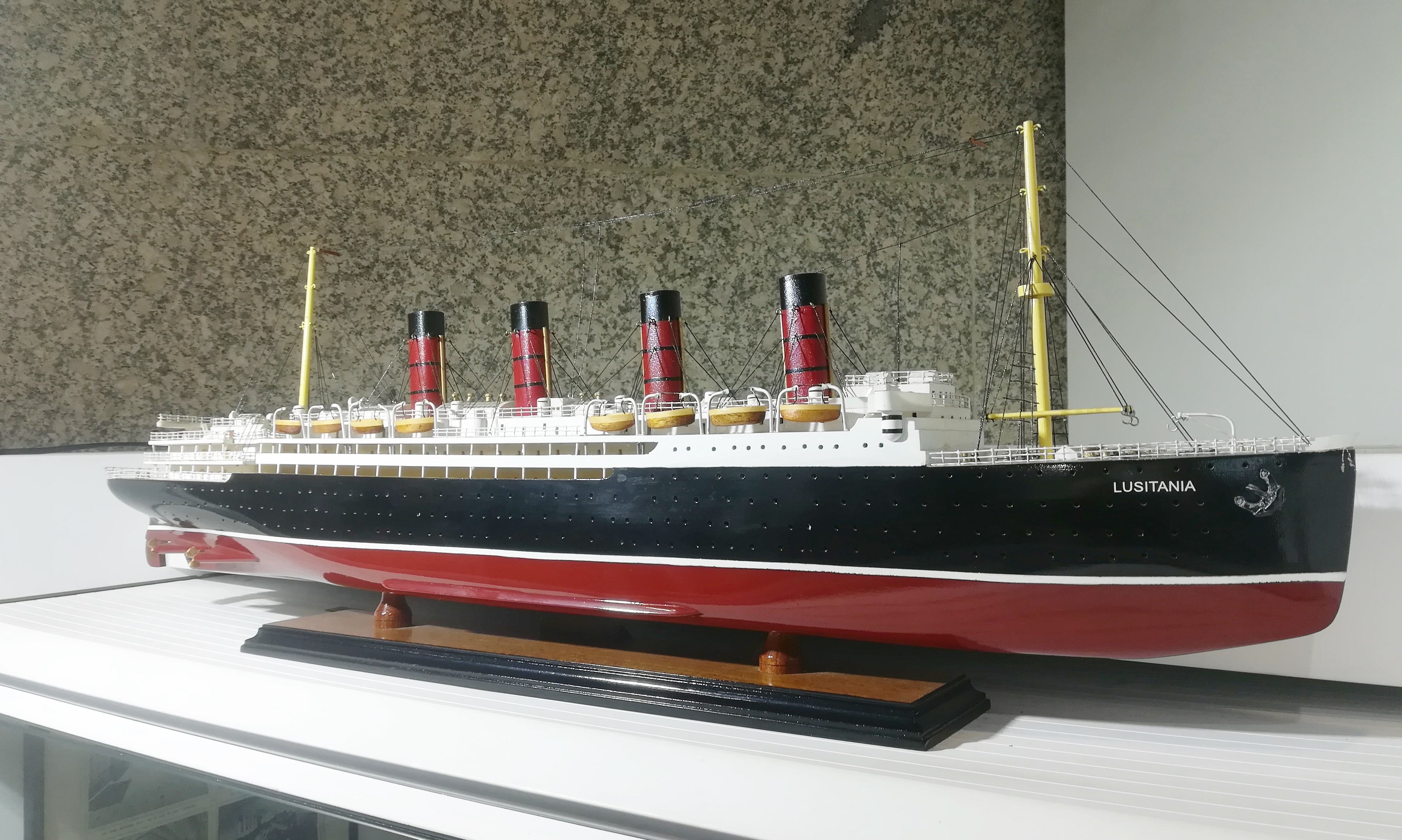 Maqueta del Lusitania. Museo del Mar de Galicia. Vigo. Provincia de Pontevedra. Galicia. España.